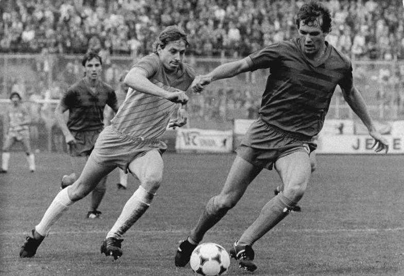 ADN-ZB-Settnik-27.9.86-pra-Berlin: Fußball-Oberliga- 1. FC Union Berlin - Energie Cottbus 1:1 - Diesen Zweikampf mit dem Union-Spieler Olaf Hirsch (l.) konnte der Cottbuser Frank Vogel (r.) für sich entscheiden.